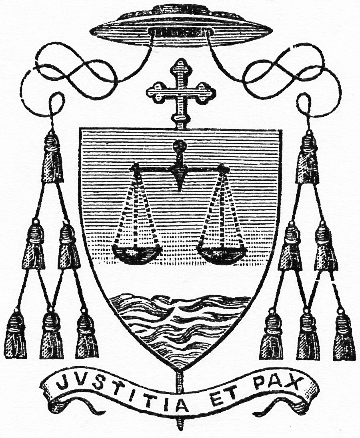 Stemma del vescovo di Fano mons. Giustino Sanchini